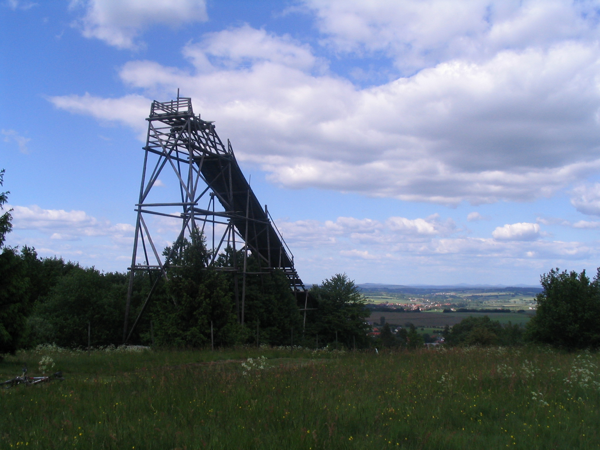 Die Skisprungschanze Bermuthshein auf dem Höllerich (575 m). Sie war von 1970 bis 1983 in Benutzung und steht seit 2003 unter Denkmalschutz.